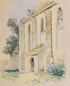 Stanislaw Barcikowski ((832 - 1897) - Fragment Kościoła